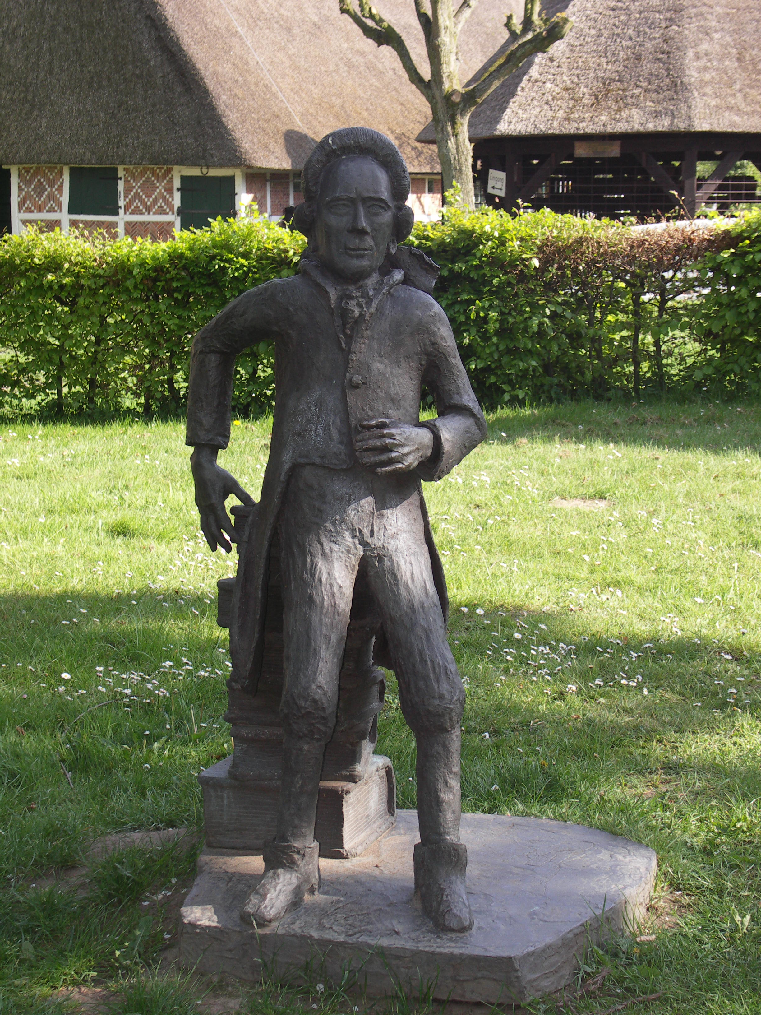 Denkmal für Georg Christoph Lichtenberg im Freilichtmuseum auf der Insel in Stade, 1999 von Volker Neuhoff